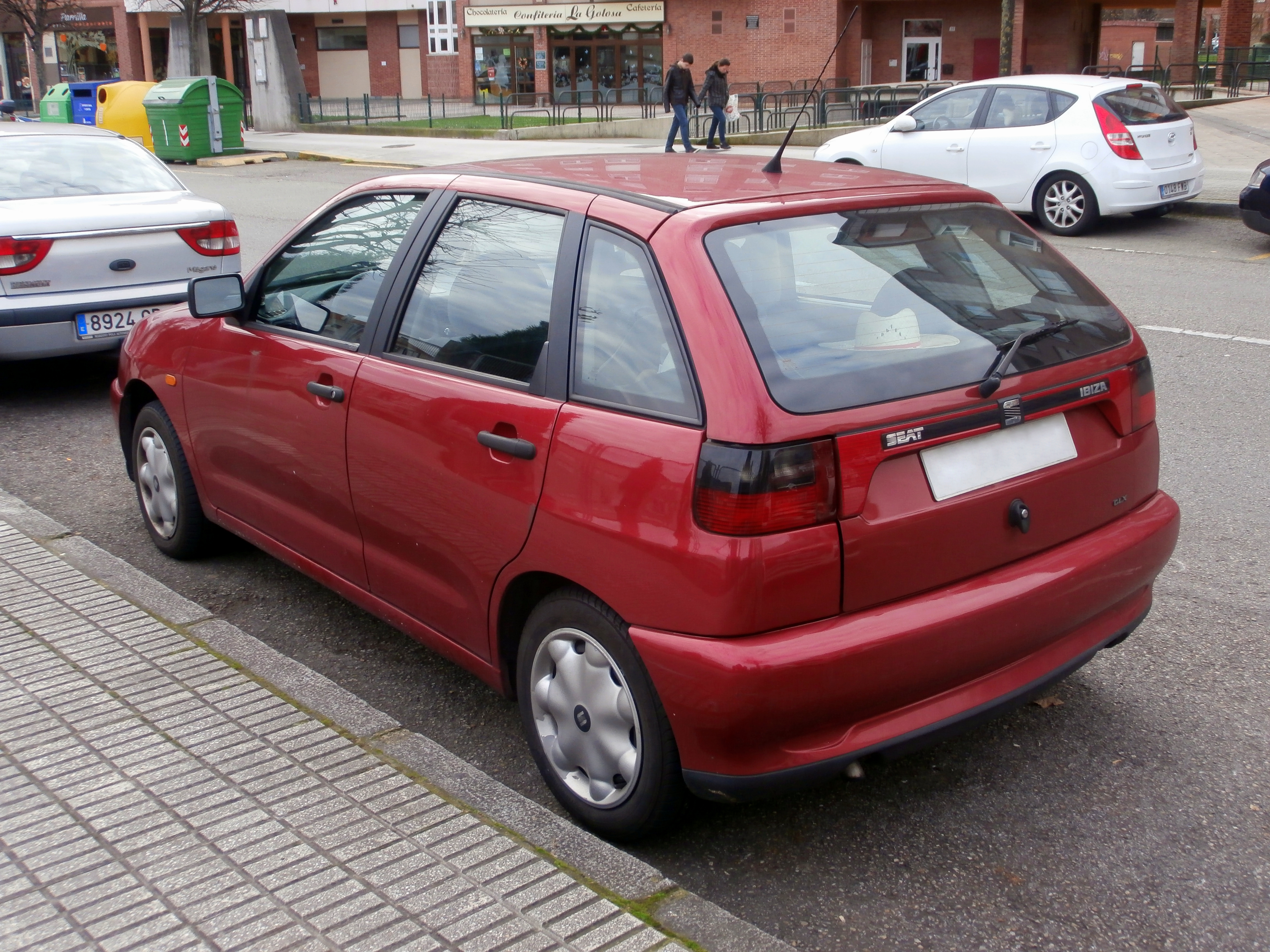 SEAT Ibiza II GLX 3-4 Trasera 1995